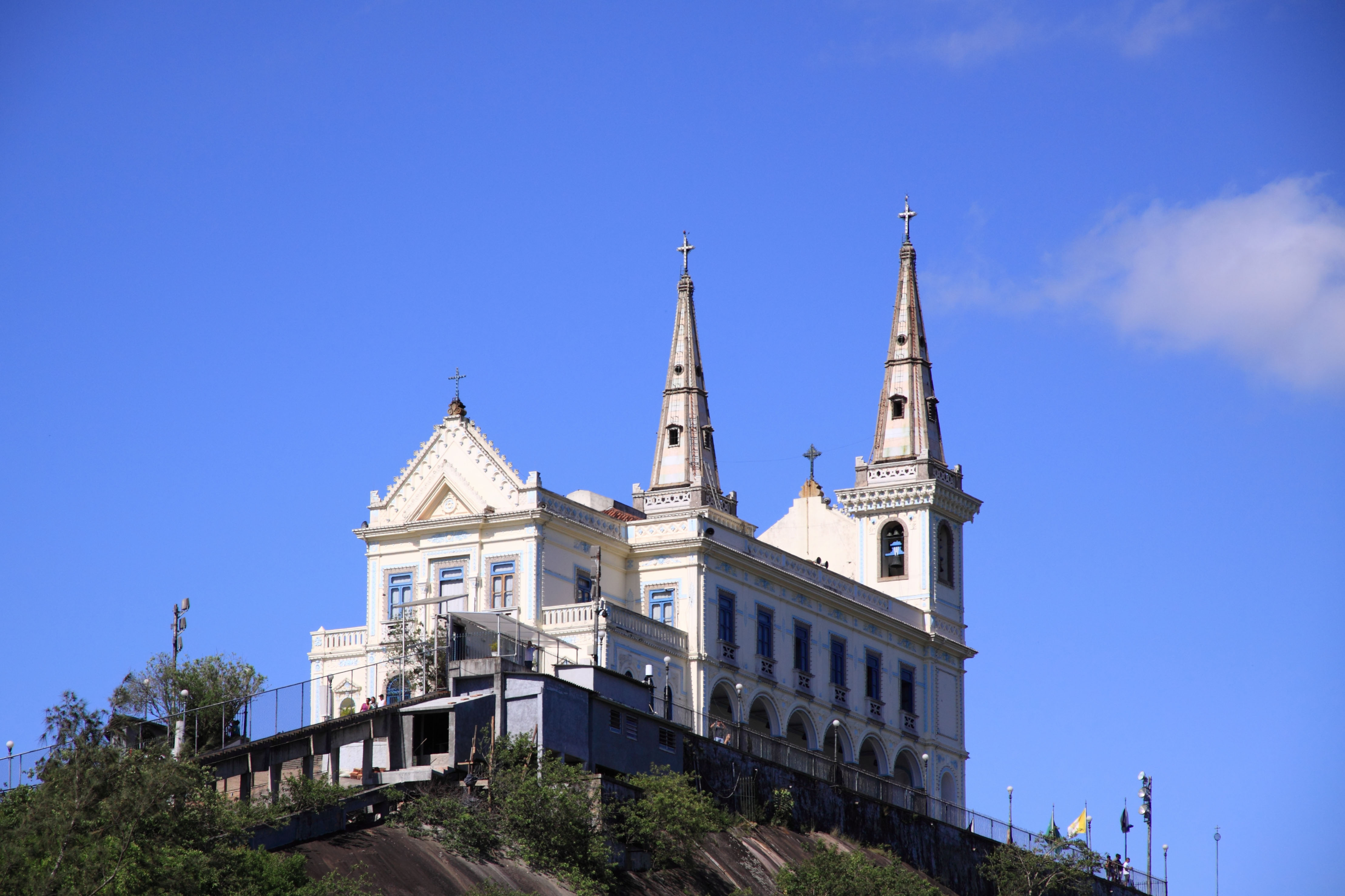 Vista do estacionamento da igreja na parte inferior.